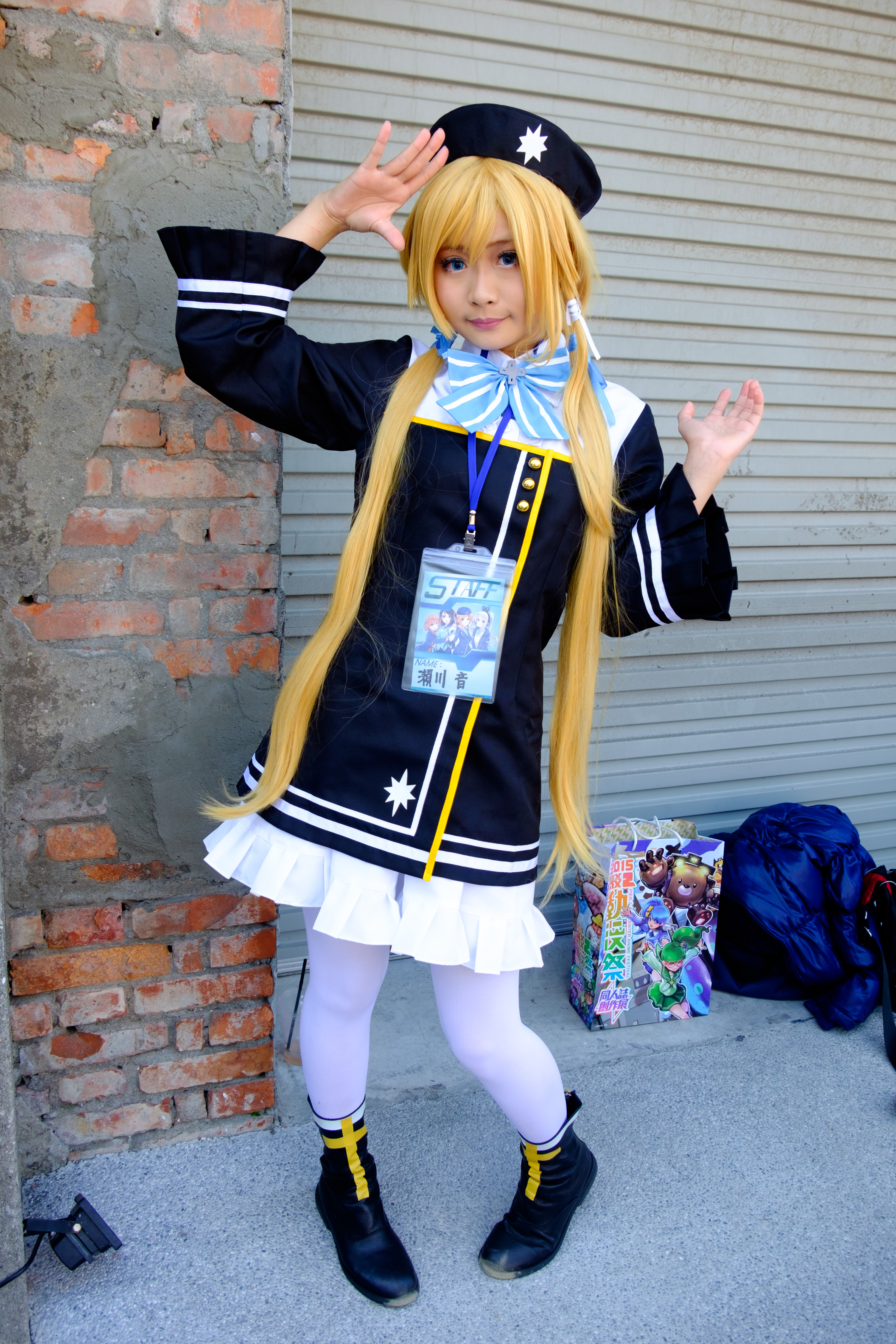 中文（台灣）: 2015駁二動漫祭第二日上午，瀨川音cosplay迷路小瑪，頸掛希萌創意工作證。